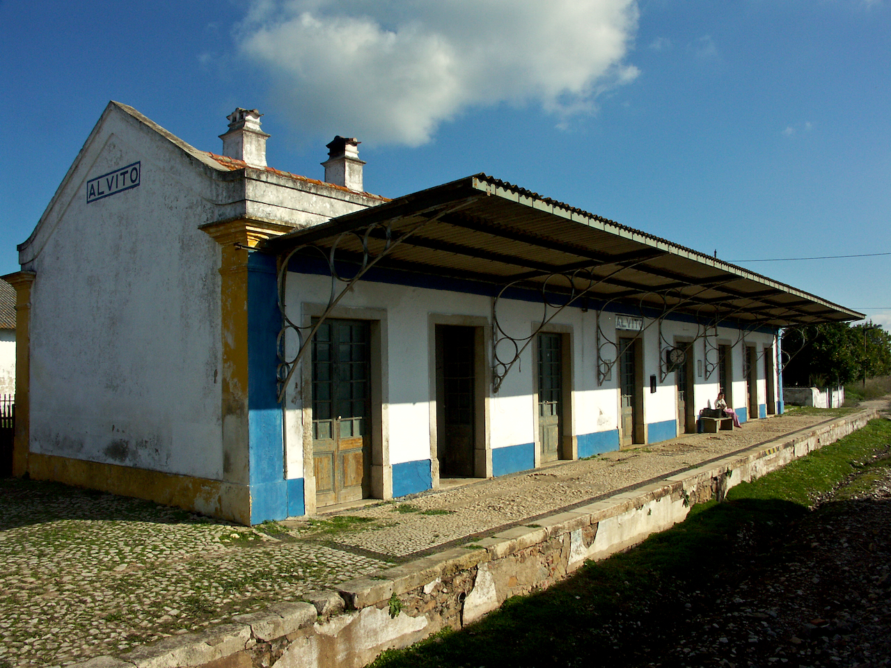 Tipo: EP (Apeadeiro) Local: Alvito Linha do Alentejo, PK 125 Data e hora: 4 de Dezembro de 2004 12h11